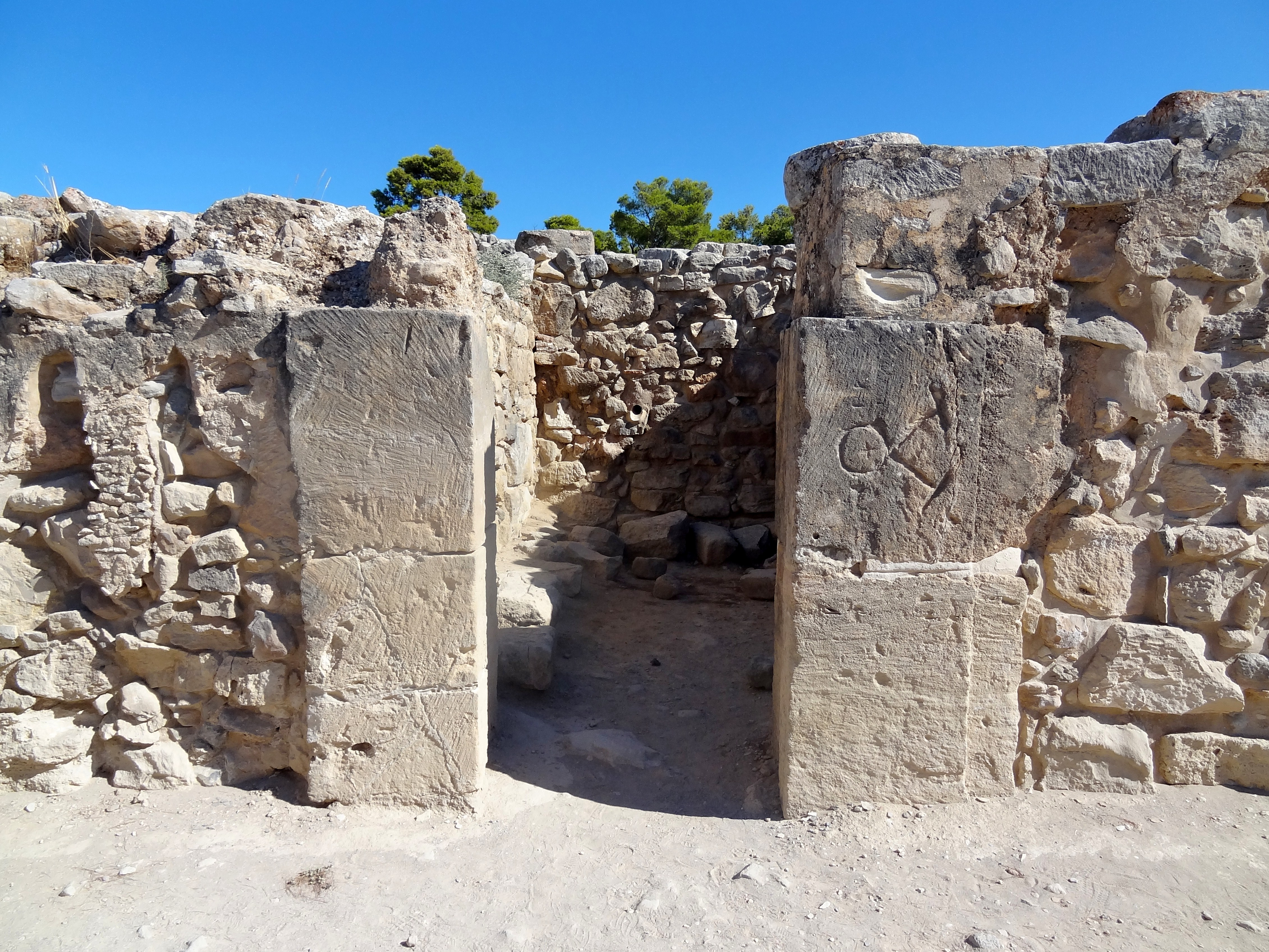 Palast von Phaistos (Φαιστός), Gemeinde Festos, Regionalbezirk Iraklio, Kreta, Griechenland